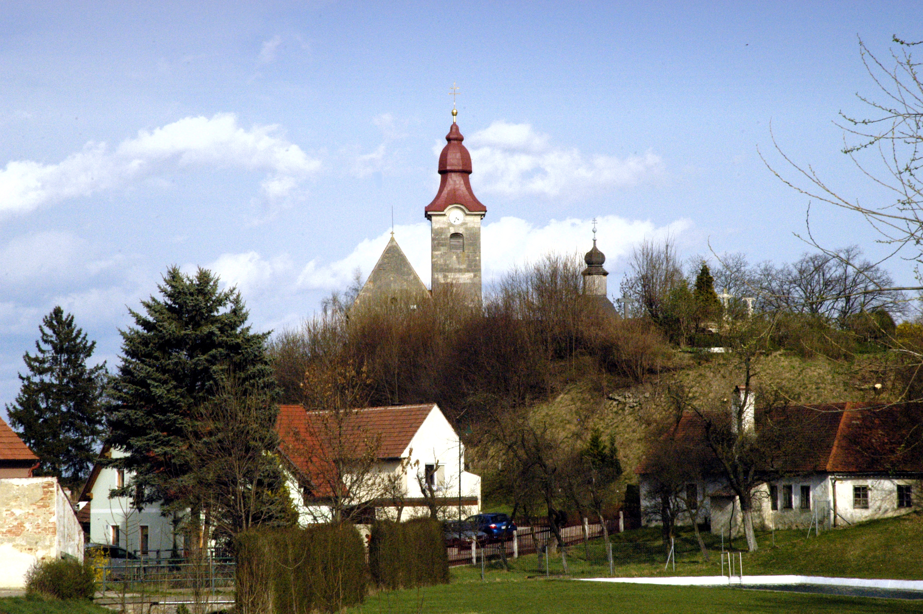 Auf dem Burgberg in Kühnring befand sich die Stammburg der Kuenringer